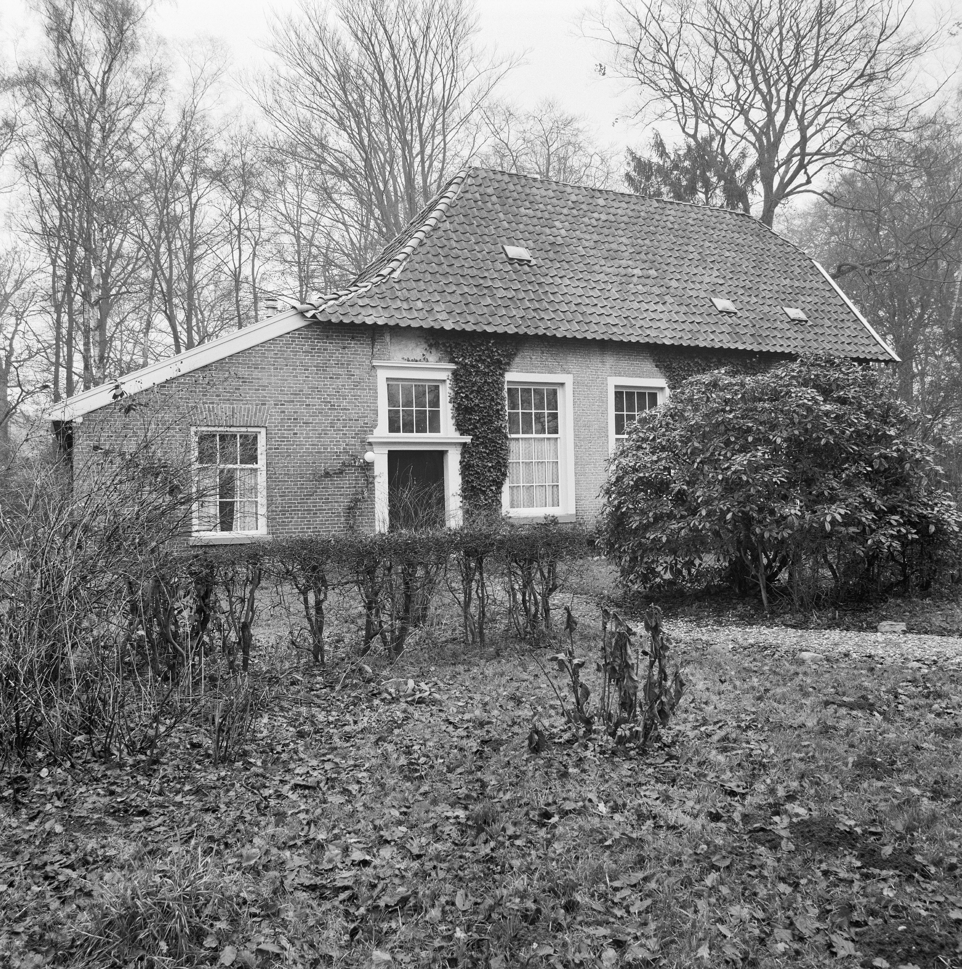 Exterieur OVERZICHT VOORGEVEL